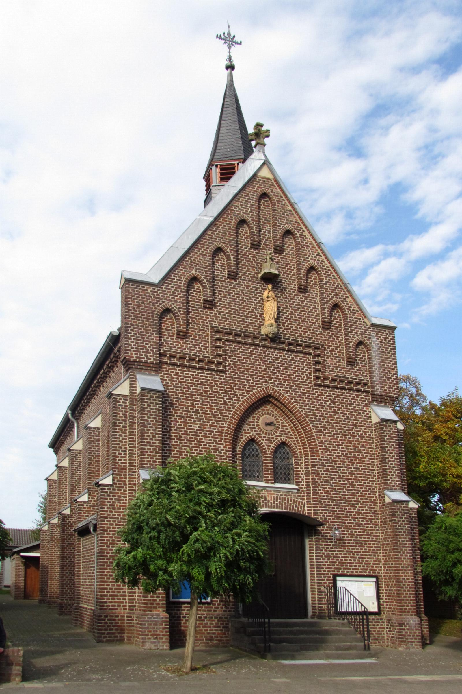 Kirche in Kuckum